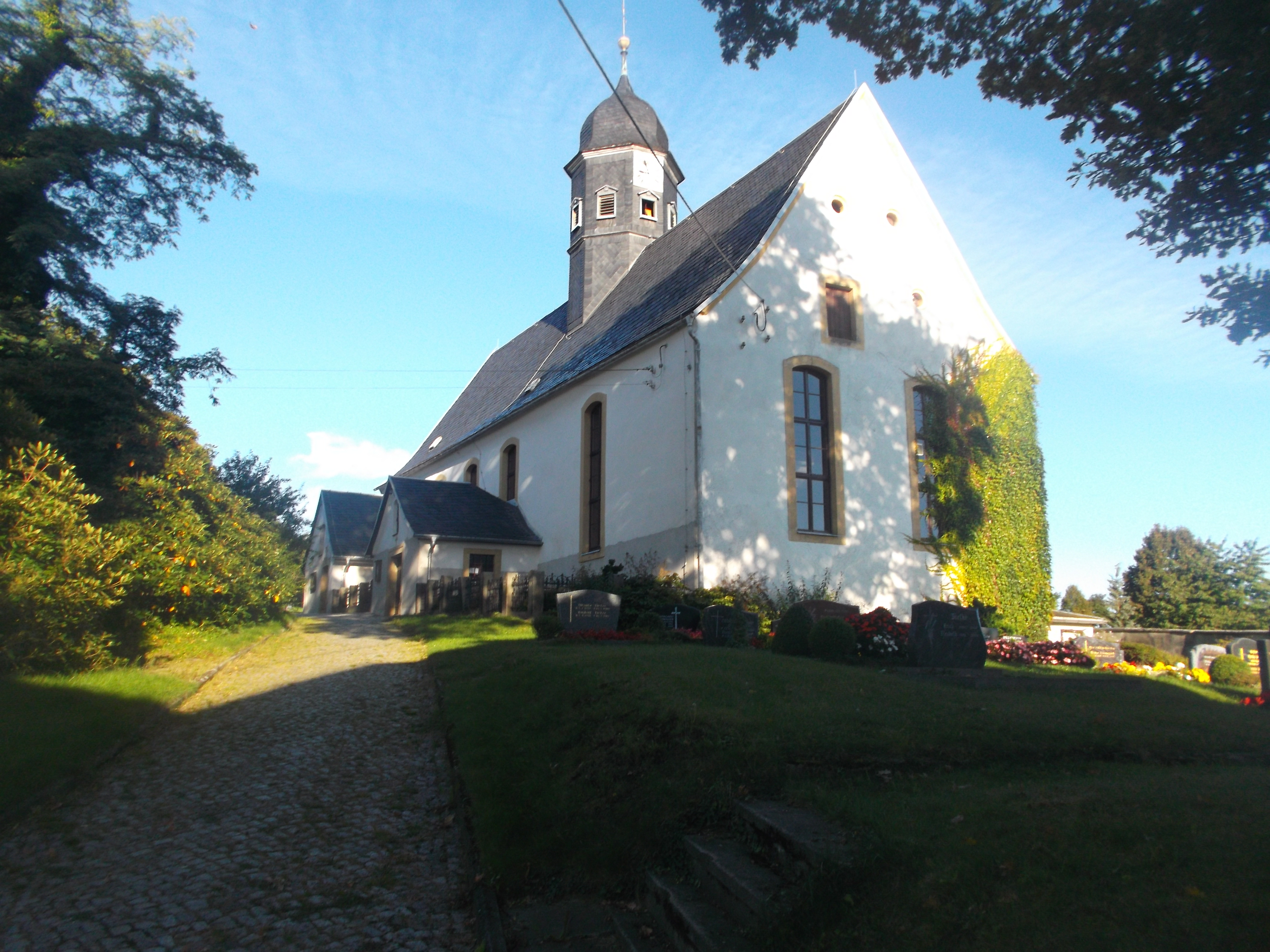 Kirche Seifersdorf Ansicht von der Zufahrt